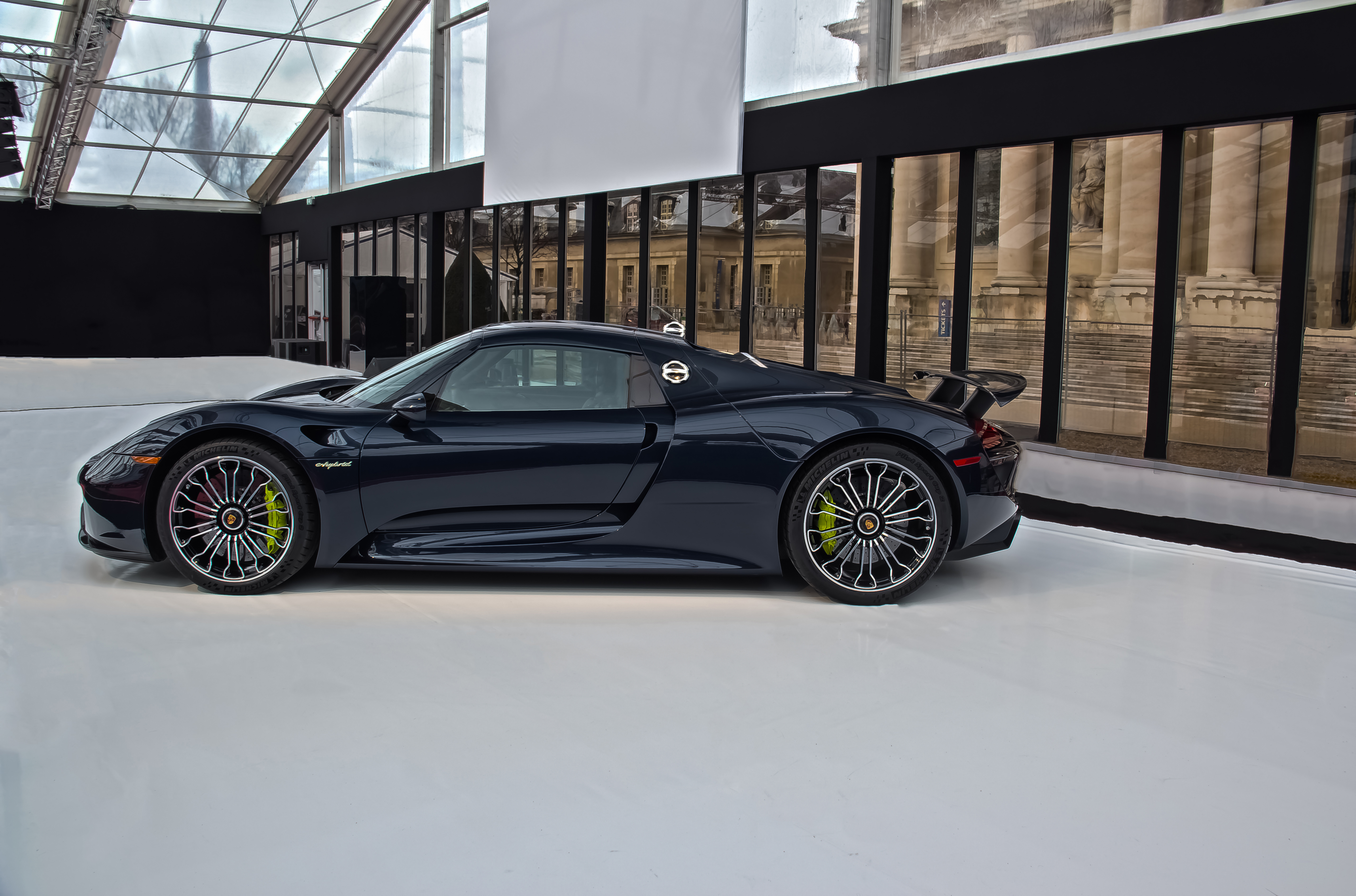 Exposition Concept cars du 29 janvier au 2 février 2014, Hôtel national des Invalides, 75007 Paris. Festival automobile international 2014.